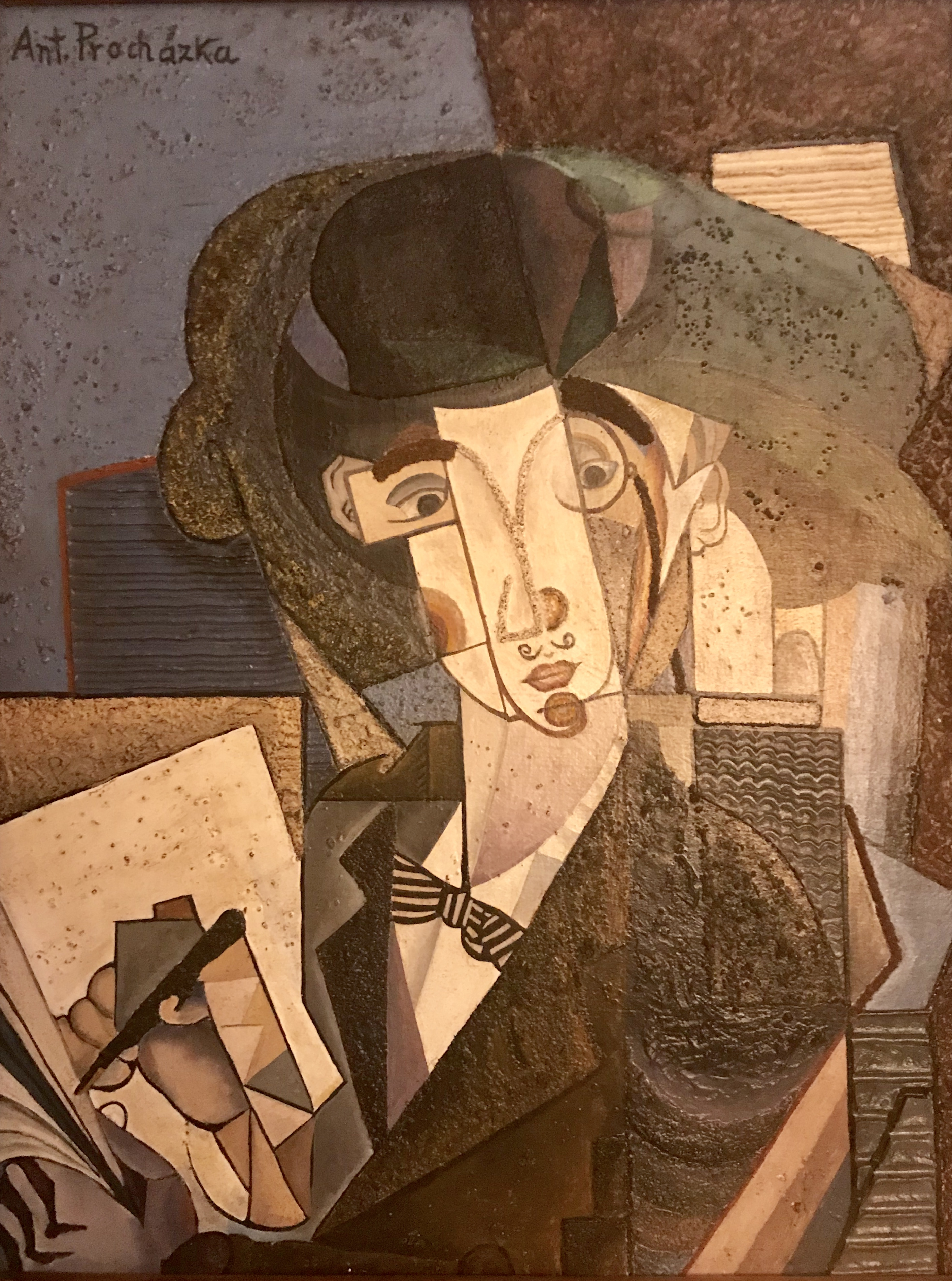 oil on wood / combined technique